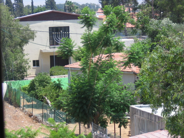 בית הכנסת על שם הרמב"ם בכפר אברהם. צולם על ידי